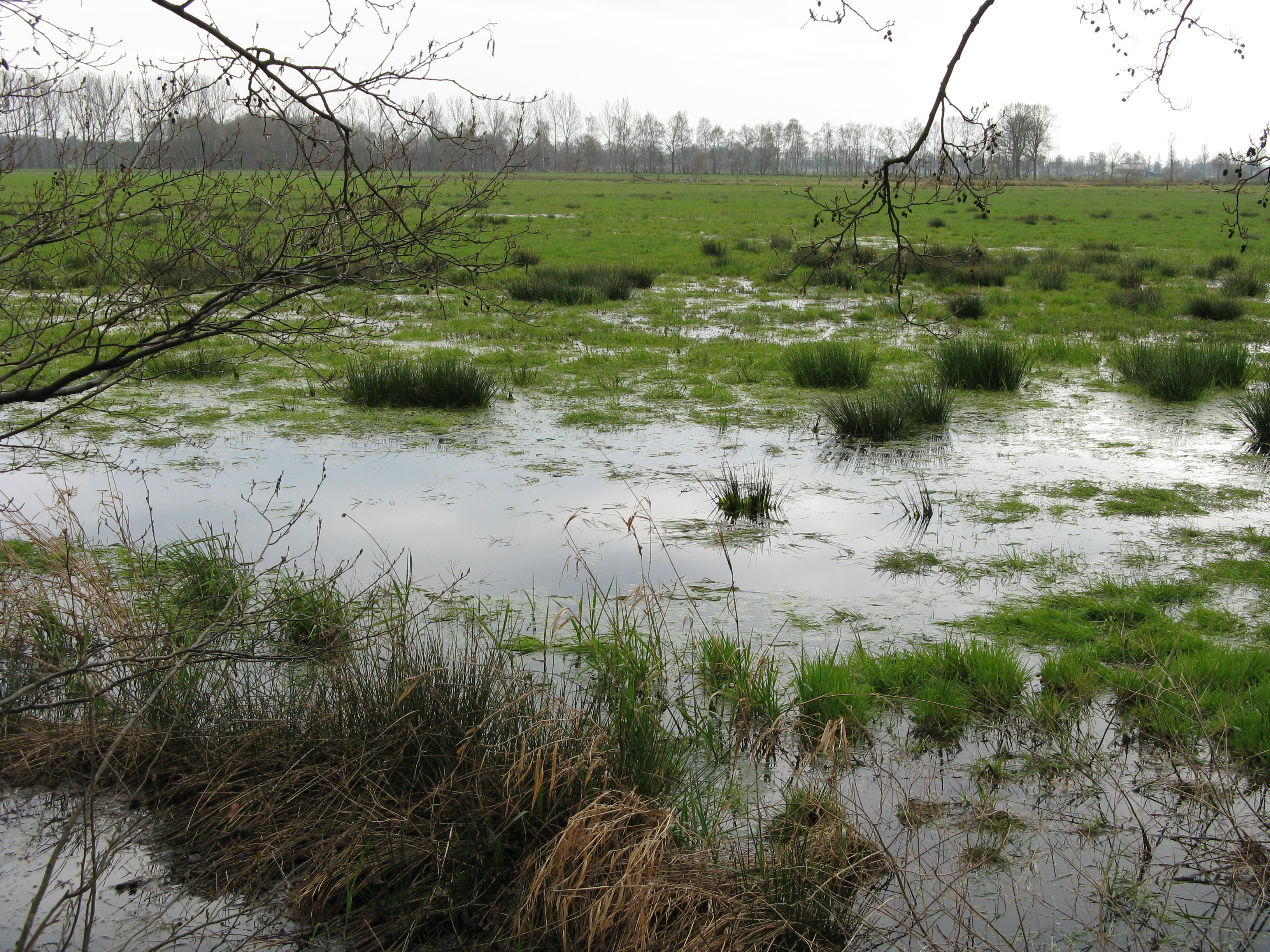 Binsen im Oppenweher Moor, Nordrhein-Westfalen/Niedersachsen – Bildposition geschätzt